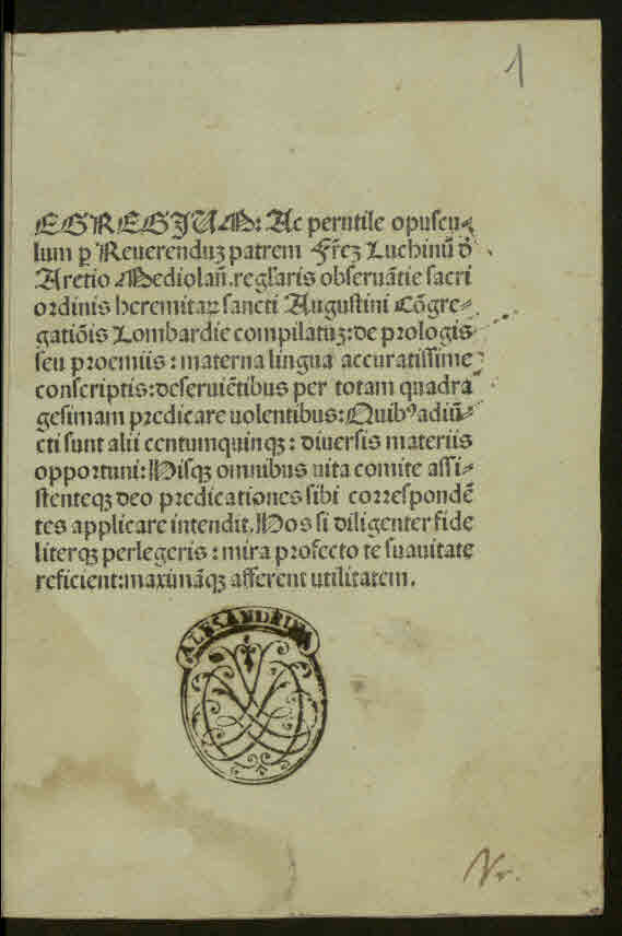 De prologis seu proemiis materna lingua conscriptis. - Impressum Mediolani : industria et impensa Alexandri Minutiani oratoris facundissimi, anni Iubilei 1500 die 12 novembris. - 124 c. ; a-p⁸, q⁴ ; 8º. - Testo in italiano, titoli in latino .